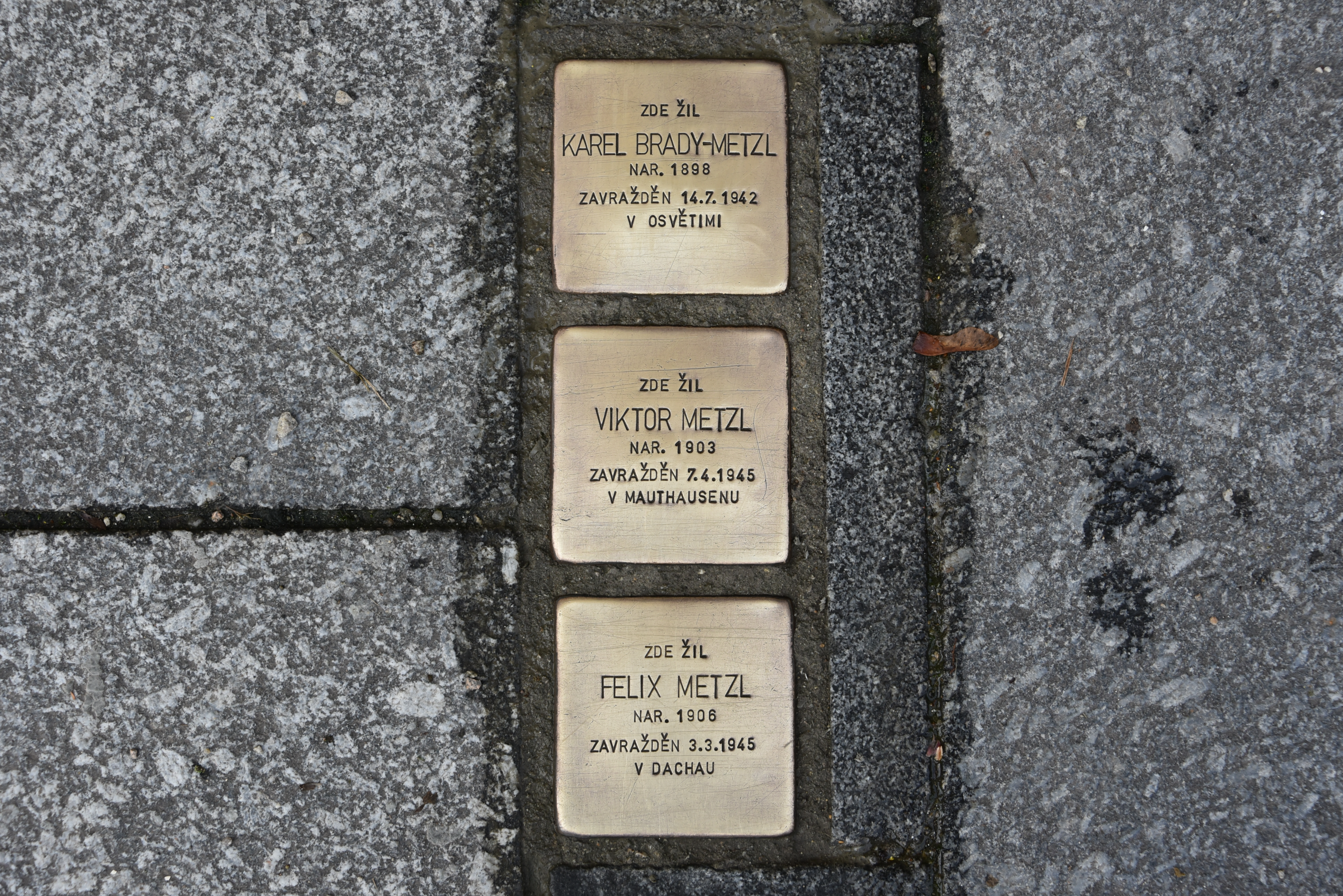 Stolpersteine für Familie Metzl